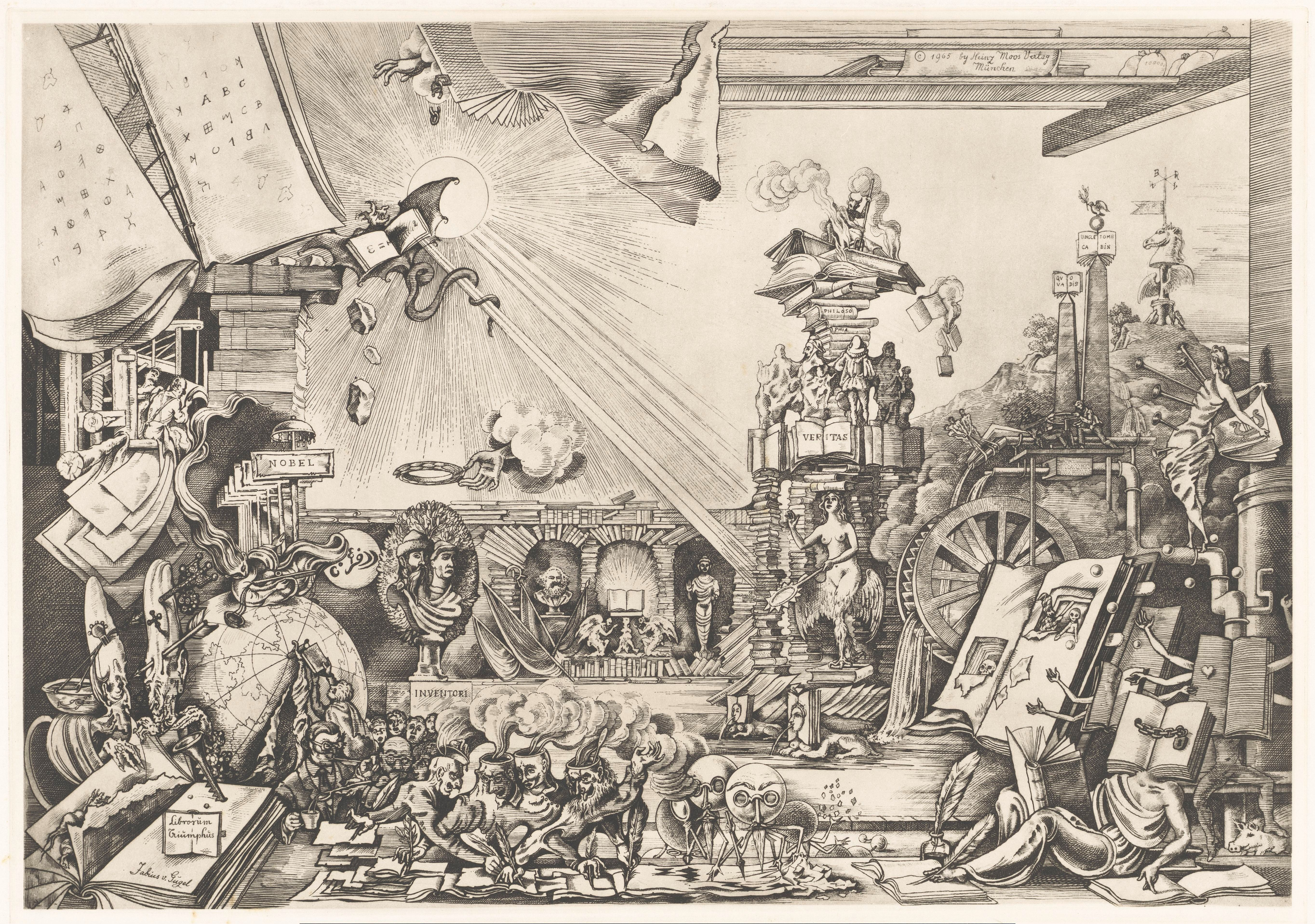 IdentificatieTitel(s): Surrealistische voorstellingLibrorum Triumphus (titel op object)Objecttype: prent Objectnummer: RP-P-2015-26-1996Oplage: 42/200Opschriften / Merken: verzamelaarsmerk, verso, gestempeld: Lugt 4780Omschrijving: Surrealistische voorstelling met op de voorgrond schrijvende wezens, Waar: onder een groep figuren met open hersenpannen waar stoom uitkomt en een figuur met menselijk lichaam en een boek als hoofd, schrijvend met zijn voet. In de achtergrond een wand van boeken met onder meer een buste van Marx en een halfnaakte vrouw met duivelspoten die met de schittering van een spiegel een duivel uit de lucht schiet. Boven haar rijst een stapel boeken omhoog met bovenop een duivel, bezig met verbranden van boeken. Rechts twee obelisken en een windvaan boven een waterrad.VervaardigingVervaardiger: prentmaker: Fabius von Gugel (eigenhandig gesigneerd)uitgever: Heinz Moos Verlag (vermeld op object)Plaats vervaardiging: prentmaker: Duitslanduitgever: MünchenDatering: 1965Materiaal: papier Techniek: etsen / plaattoonAfmetingen: plaatrand: h 379 mm × b 535 mmOnderwerpWat: surrealistische verschijnselen en representatiesmonsters of mixed human and animal shape; 'Mostri' (Ripa)handwriting, writing as activitybookVerwerving en rechtenCredit line: Legaat van de heer S. Emmering, AmsterdamVerwerving: legaat 2000Copyright: Publiek domein